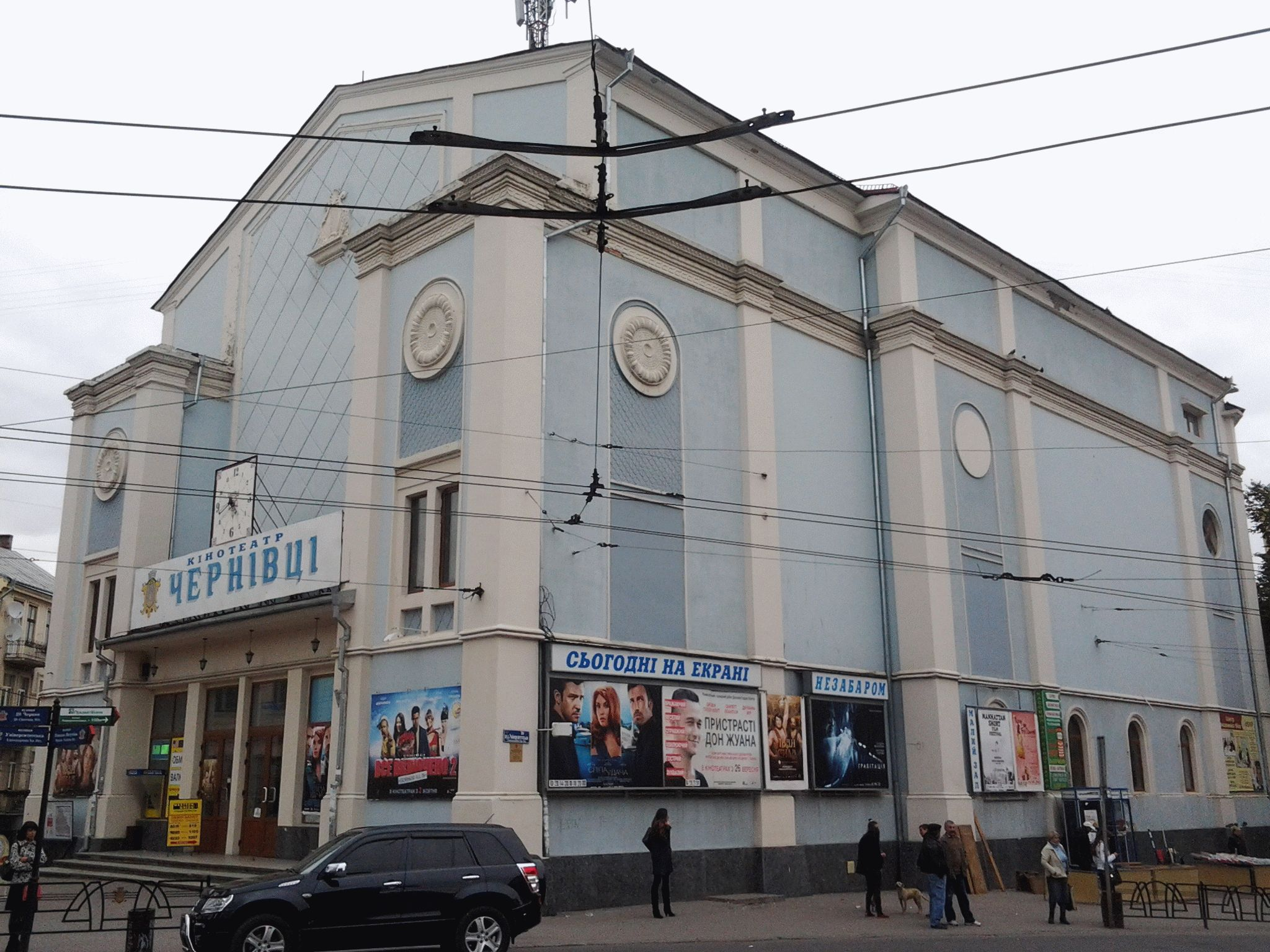 Heute Kino - früher Synagoge